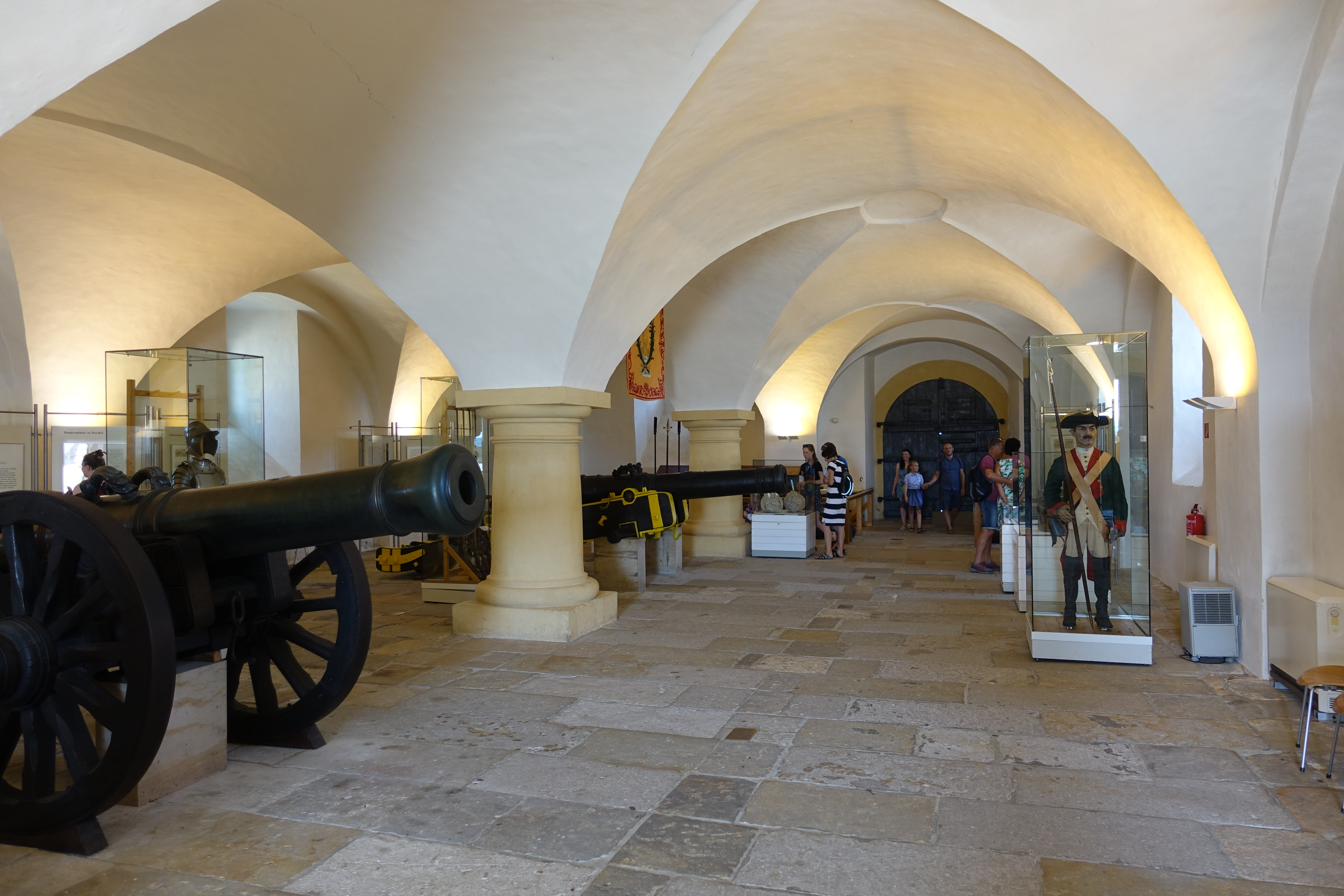 Die ab der Renaissance im Kurfürstentum Sachsen ausgebaute Festung Königstein ist eine der größten Bergfestungen in Europa und liegt inmitten des Elbsandsteingebirges